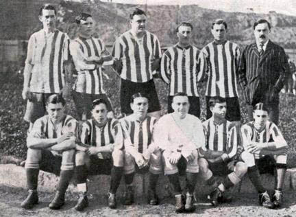 The Argentina national football team, with Harry Hayes (second from left, up).